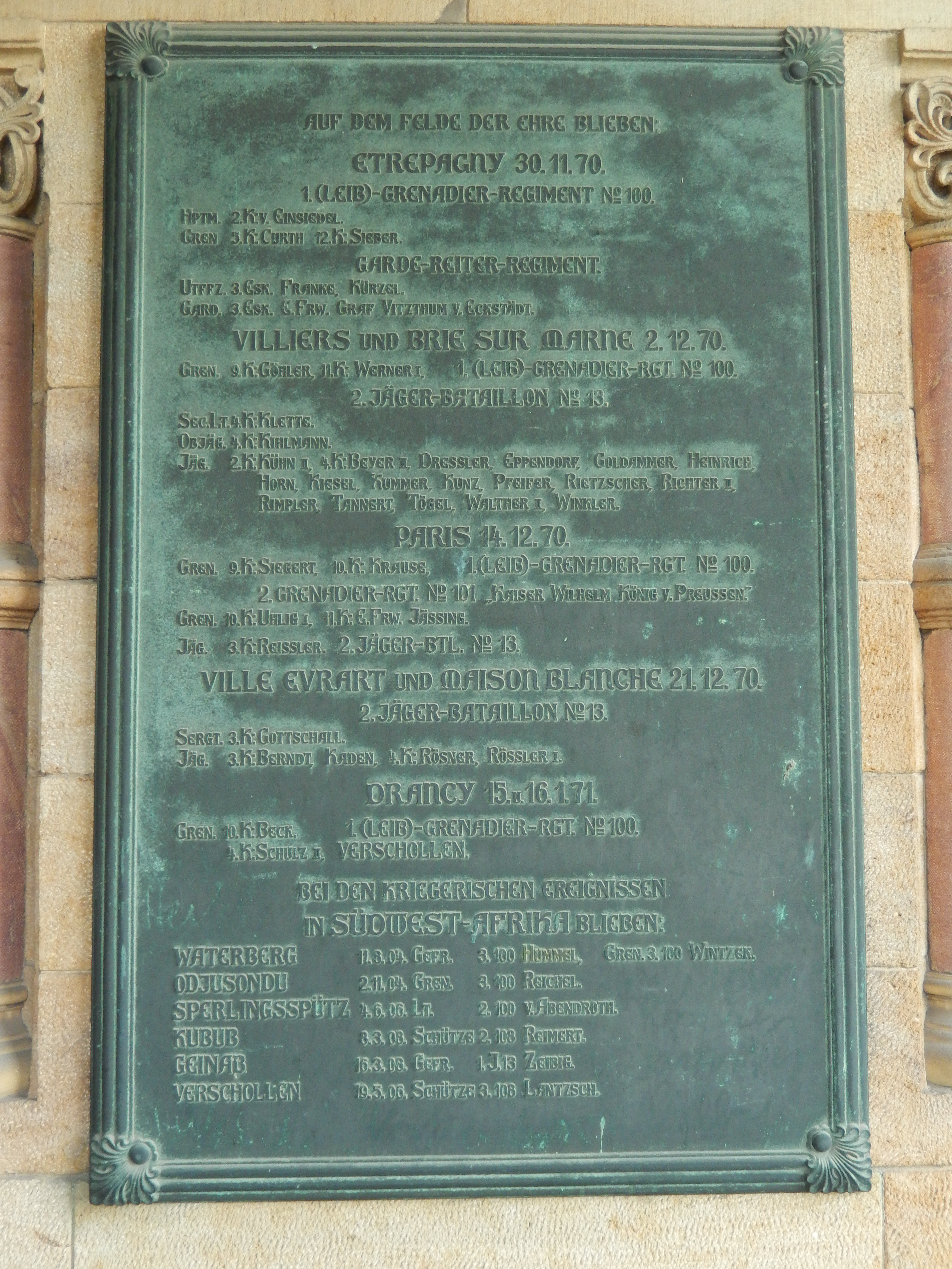 Germaniadenkmal (Dresden): Das Sächsische Kirchenamt sorgte für den Erhalt der Ehrenplatten mit den Namen der Dresdner Gefallenen des Deutsch-Französischen Krieges 1870 bis 1871 und ließ diese in einer offenen Ehrenhalle am Hauptportal der Garnisonkirche im katholischen Teil installieren.